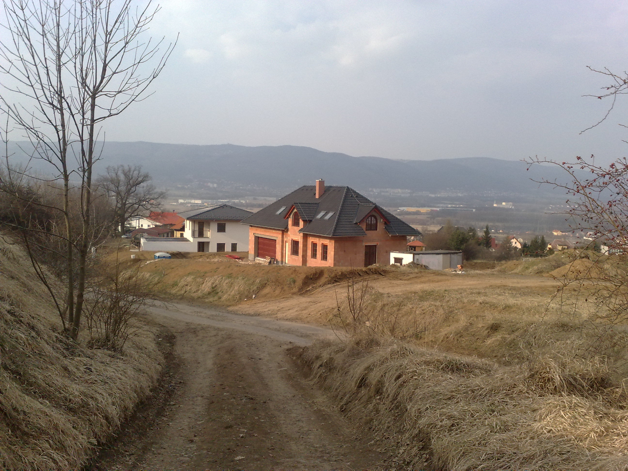 Nová výstavba mezi vesnicemi Drahkov a Suché, na Teplicku.